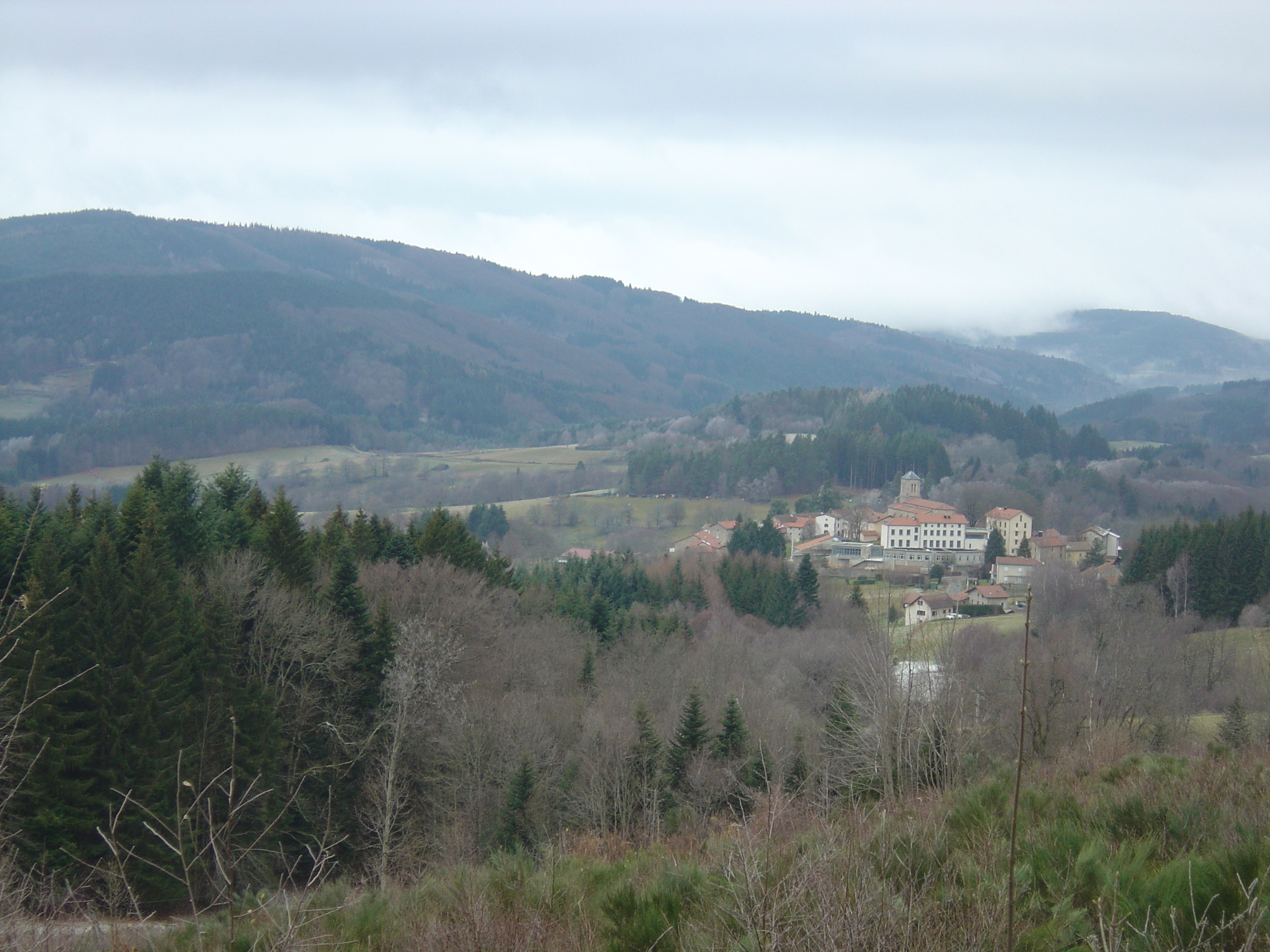 Village du Brugeron (Puy-de-Dôme; 63; Haut-Forez) vu de la route menant au col du Béal